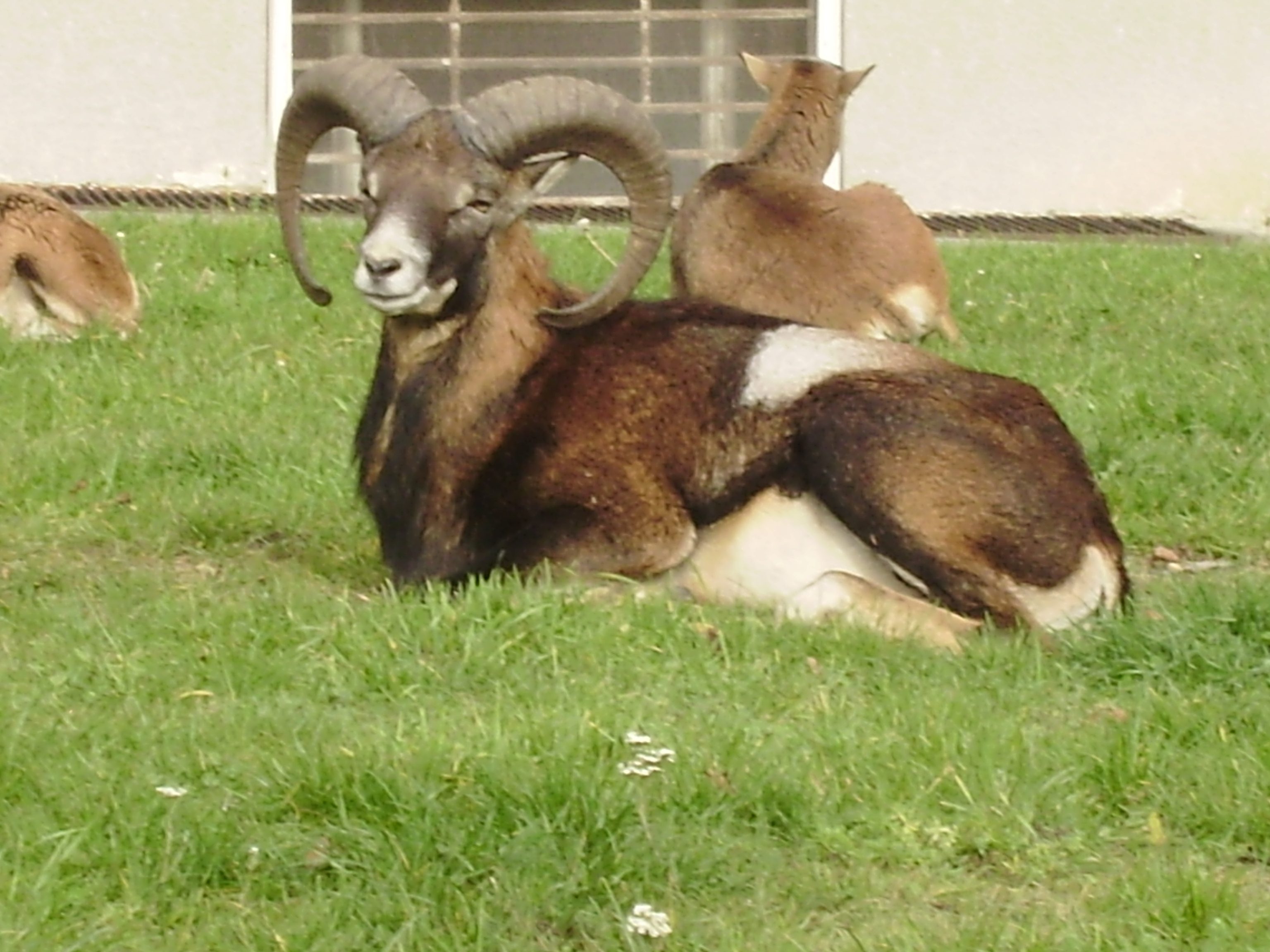 muflon se samicemi